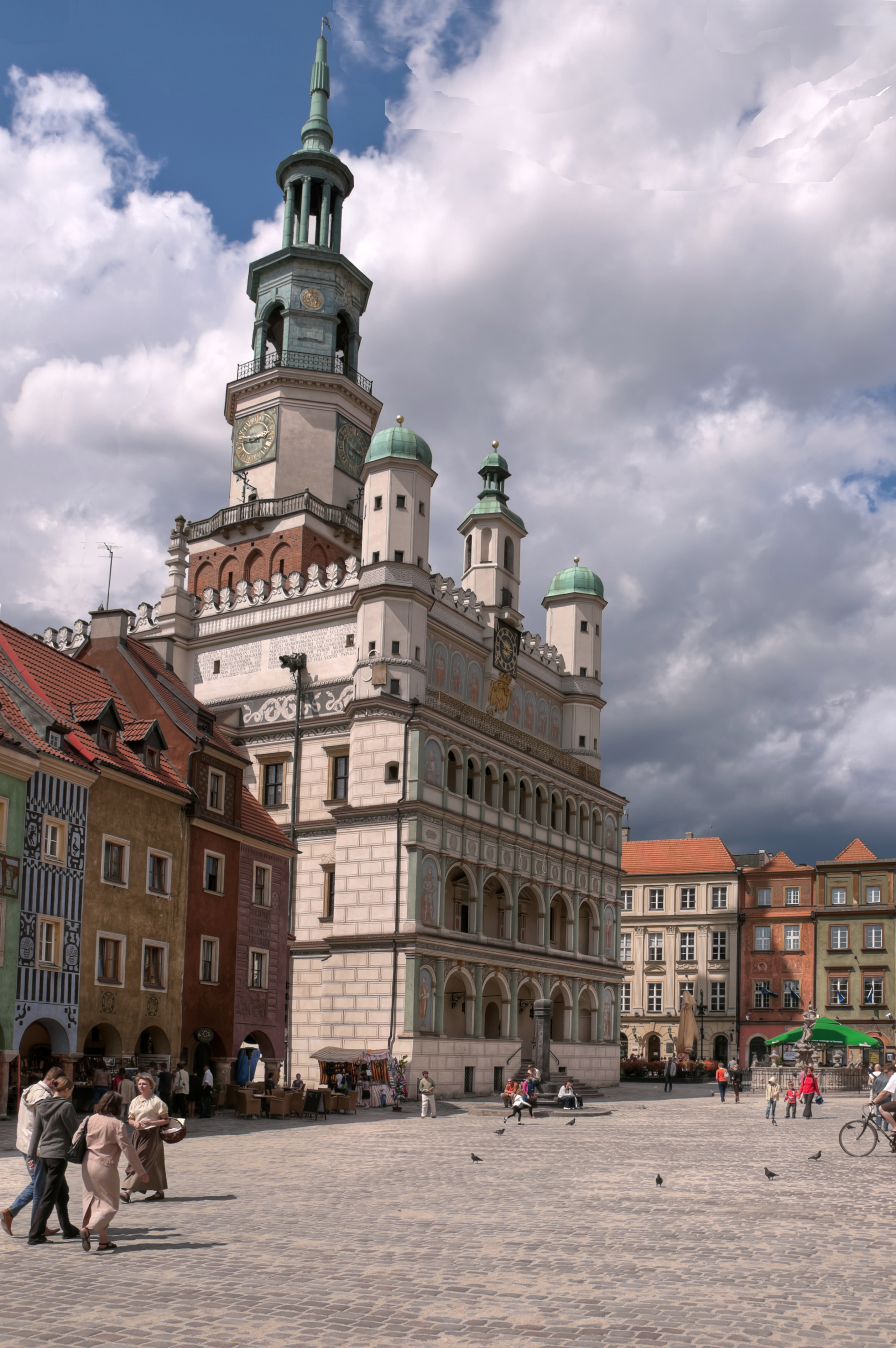 Ratusz na Starym Rynku w Poznaniu